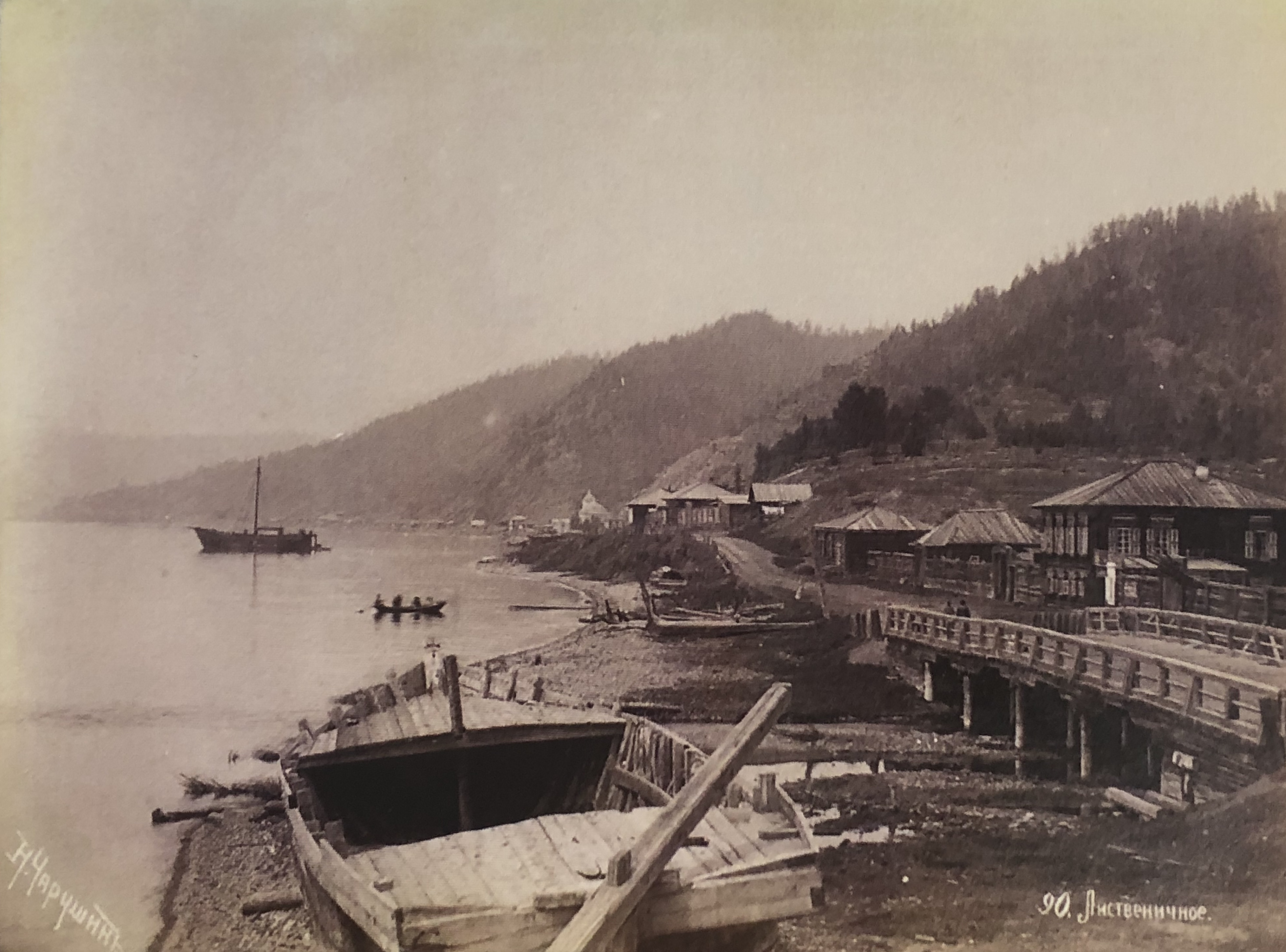 Пристань Лиственичное. Конец 19 - начало 20 века.